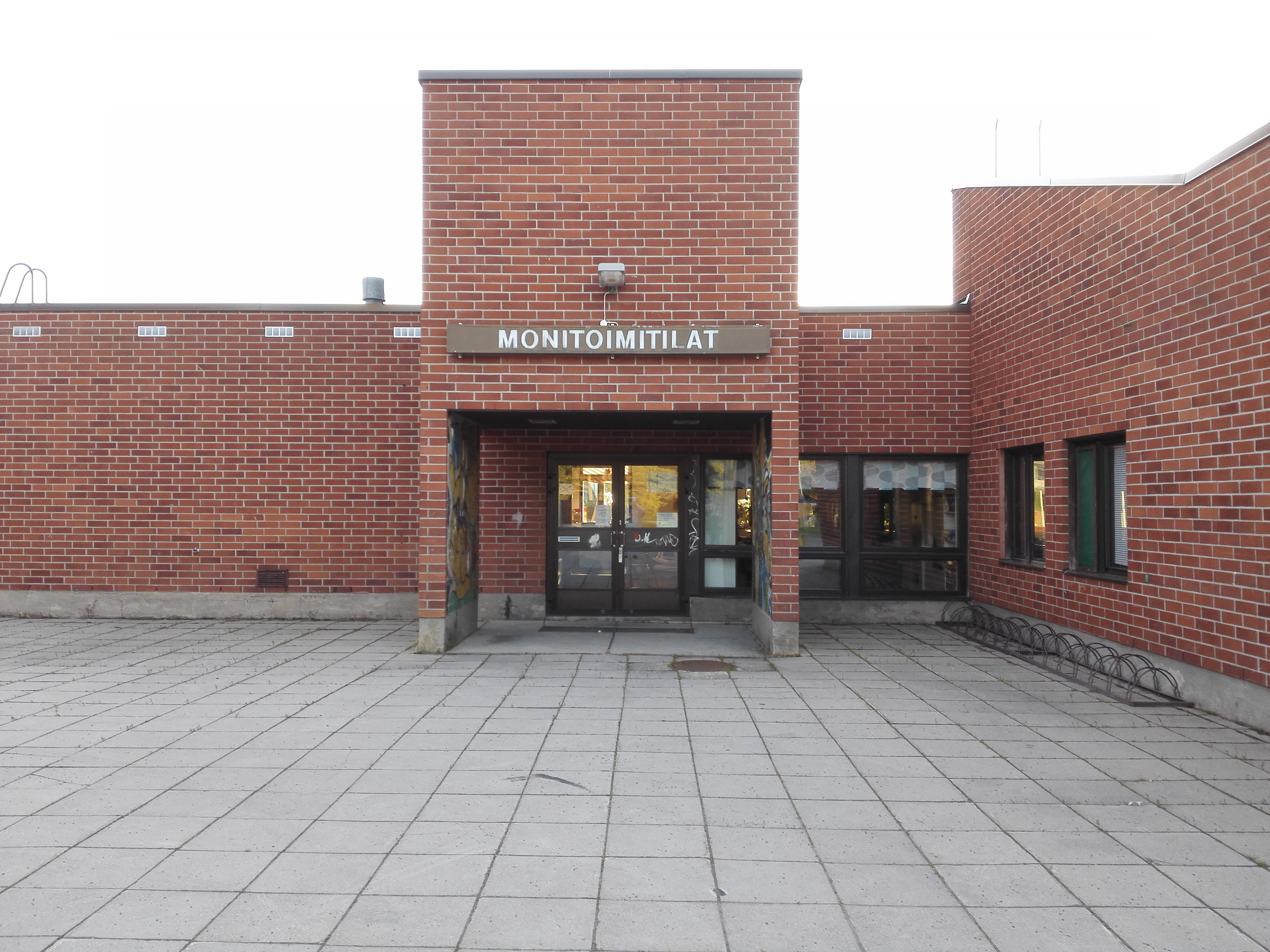 Honkasen lasten- ja nuortentalo Kempeleen Honkasessa.